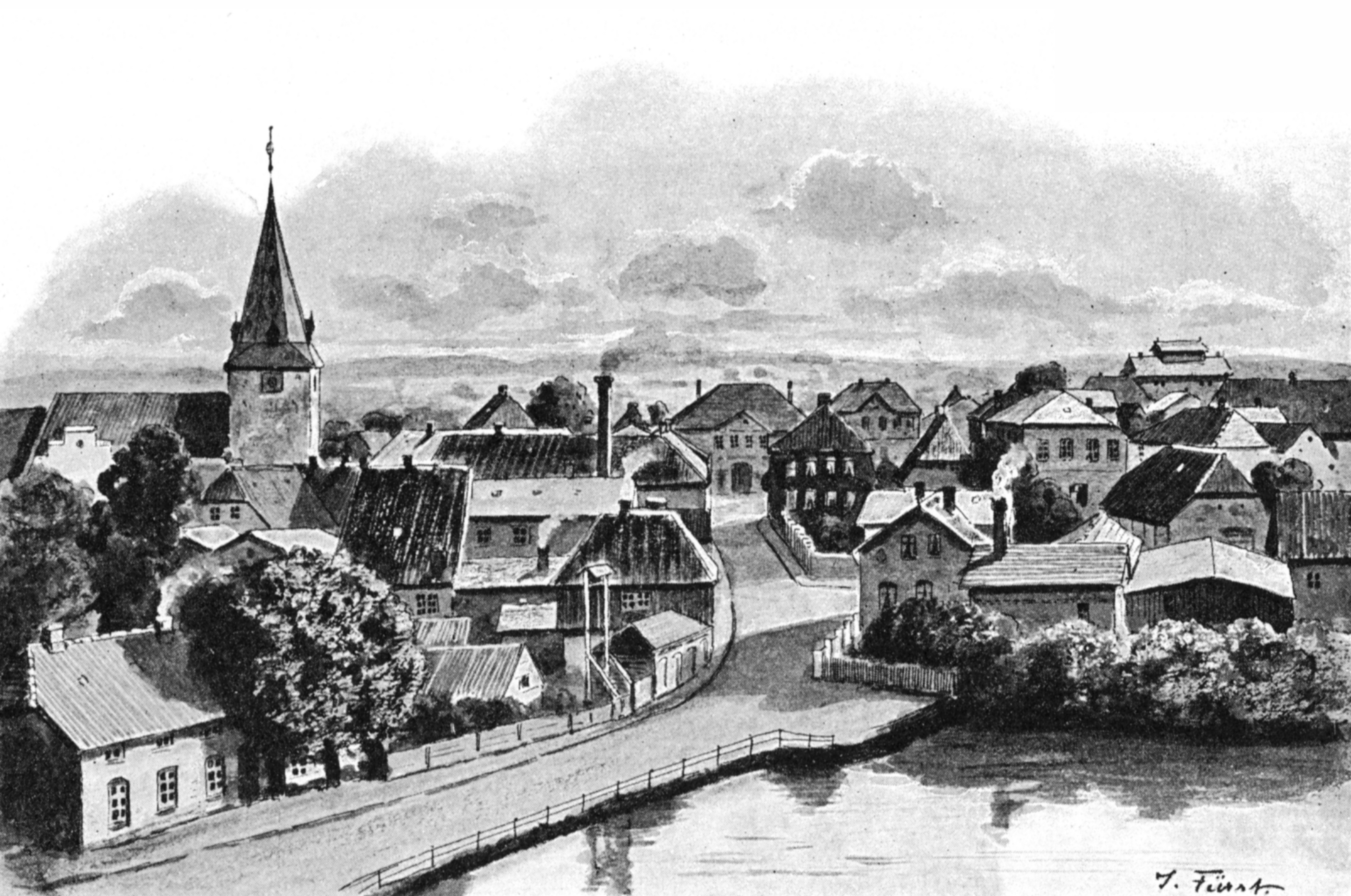 Lütjenburg um 1895, gezeichnet von Julius Fürst.